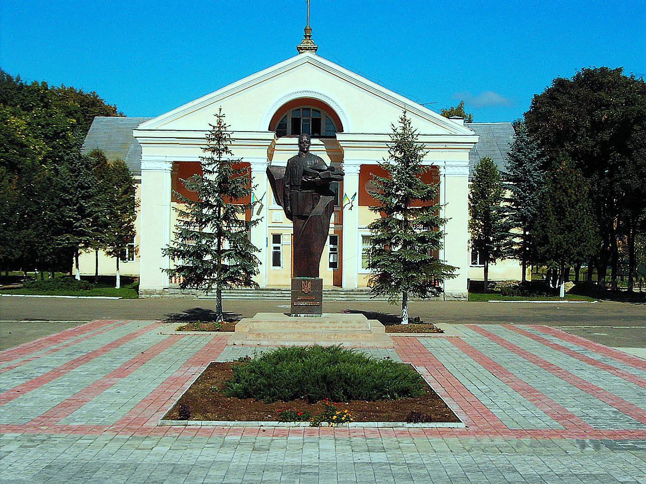 Пам'ятник Вітовському Дмитру Дмитровичу на фоні дому просвіти